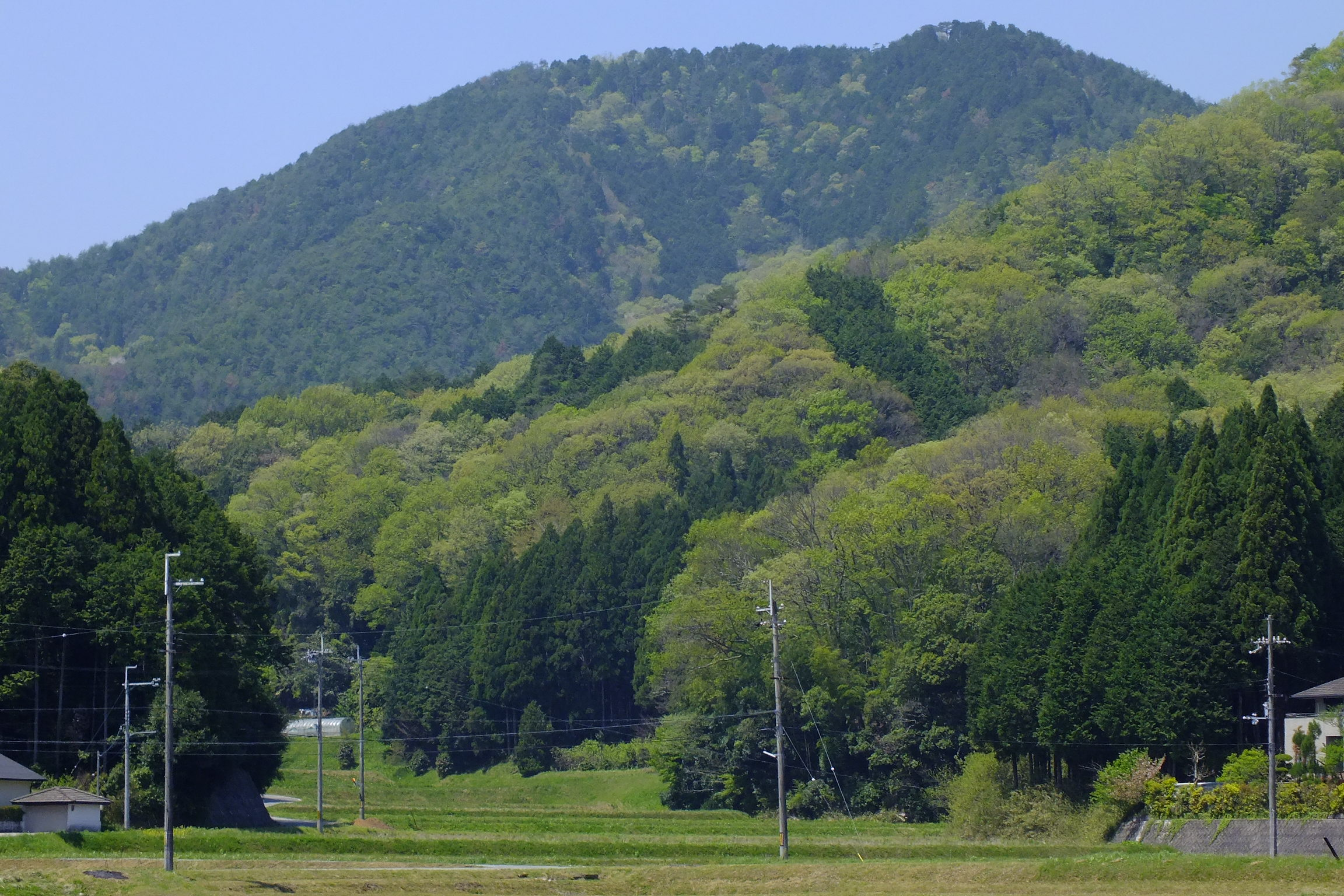 Mt.Sakazuki Sasayama,Hyogo 盃ヶ岳（篠山市藤岡）